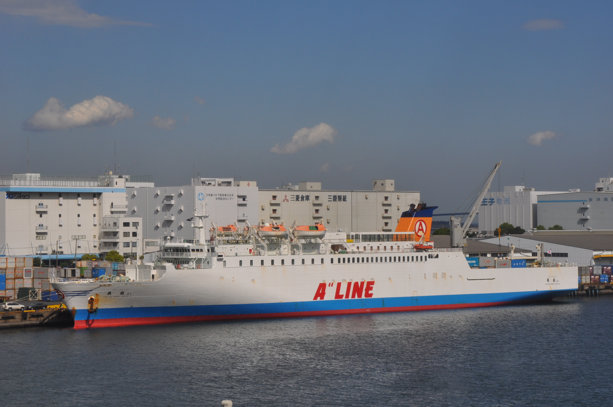 東京港フェリーターミナルに接岸している沖縄・奄美航路のクルーズフェリー２１（マルエーフェリ）